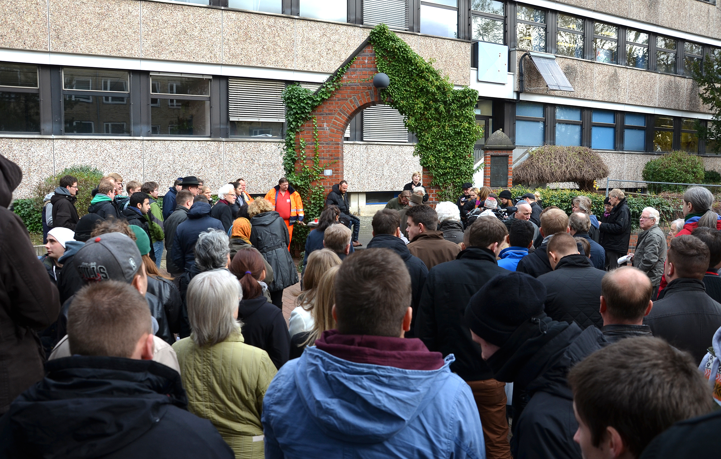 An der Gedenkveranstaltung vor dem Mahnmal zur Erinnerung an jüdisches Leben in der Ohestraße während der Verlegung der sieben Stolpersteine der Familie von Israel Alter (zugleich verwandt mit der Familie Maissner, deren Stolpersteine am selben Tag vor dem heutigen Gebäude Lange Laube 1 verlegt wurden), nahmen zahlreiche Schülerinnen und Schüler des Berufsschulzentrums teil. Zum gemeinsamen Gedenken waren die Verwandten und Nachfahren der Opfer im November 2013 für mehrere Tage angereist aus Kanada, Südafrika und Israel ...